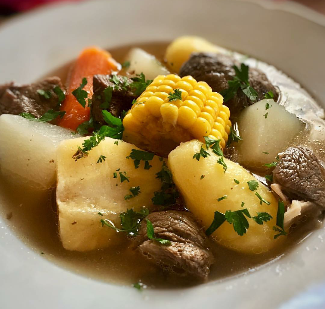 Tradicional sopa de olla de carne